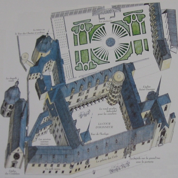 Reproduction d'après un plan du Palais Ducal de Nancy (archives municipales de Nancy). À gauche : l'Église des Cordeliers et la Chapelle Ducale, tombeaux des Ducs de Lorraine. En bas du plan côté rue, façade principale du palais donnant sur la rue. Les autres bâtiments (y compris la Collégiale Saint-Georges à droite du plan) et jardins en terrasse furent détruit par Léopold.